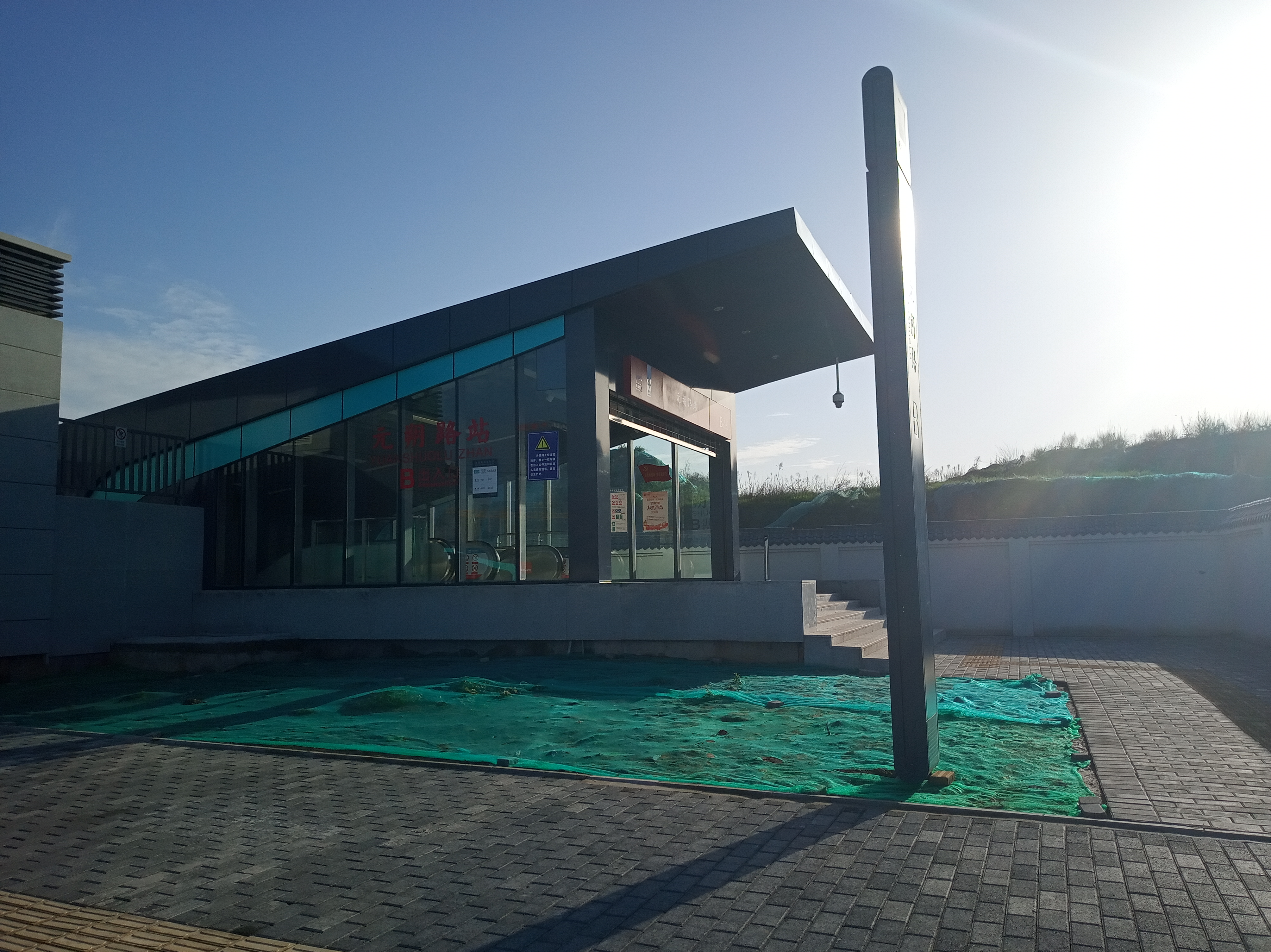 西安市未央区元朔路站B入口